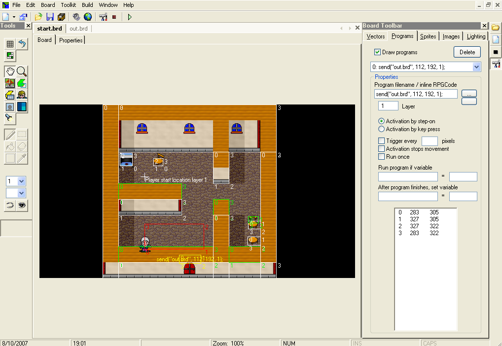 Editor do RPG Toolkit, editando uma cena